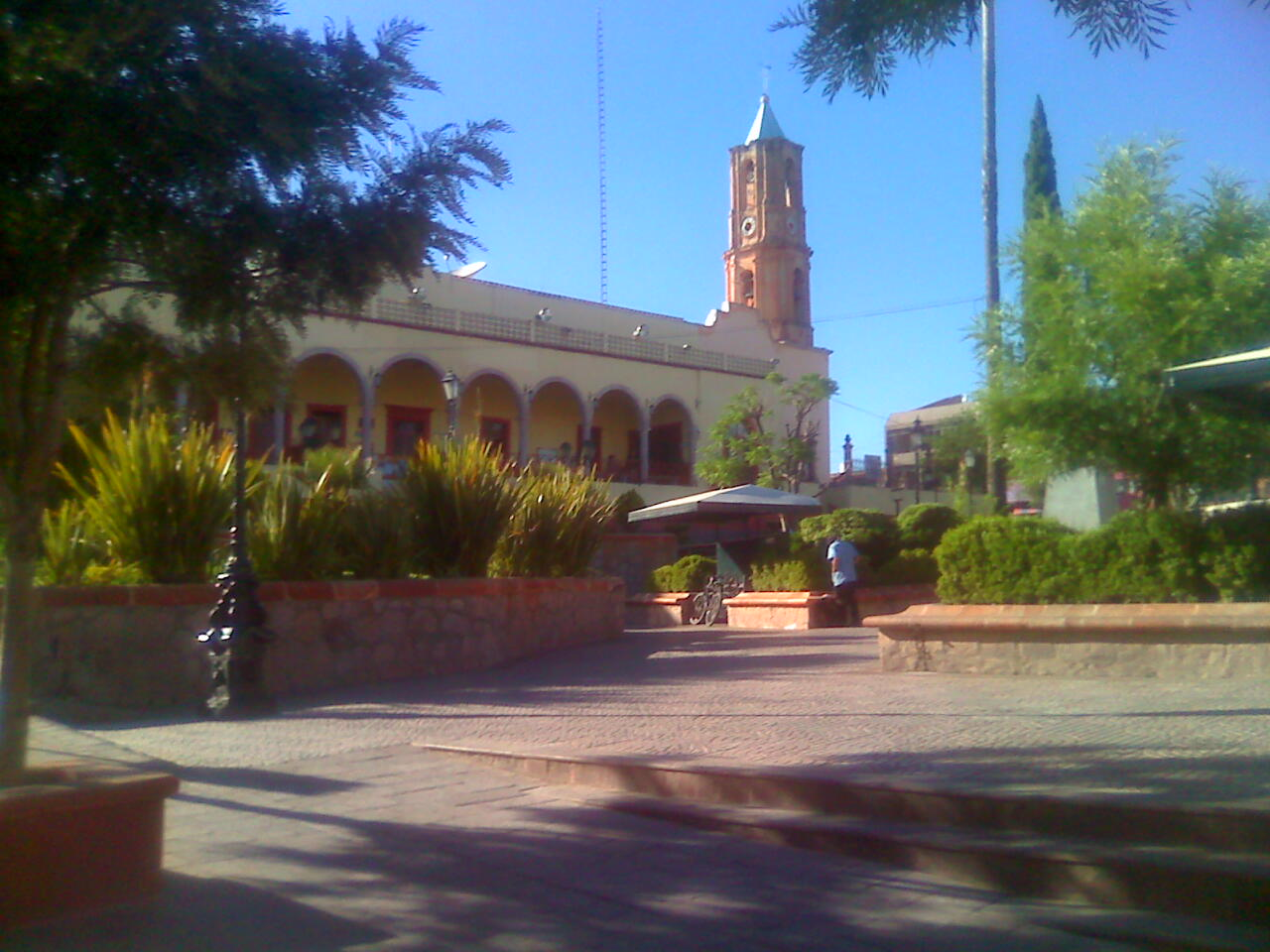 Presidencia y parroquia